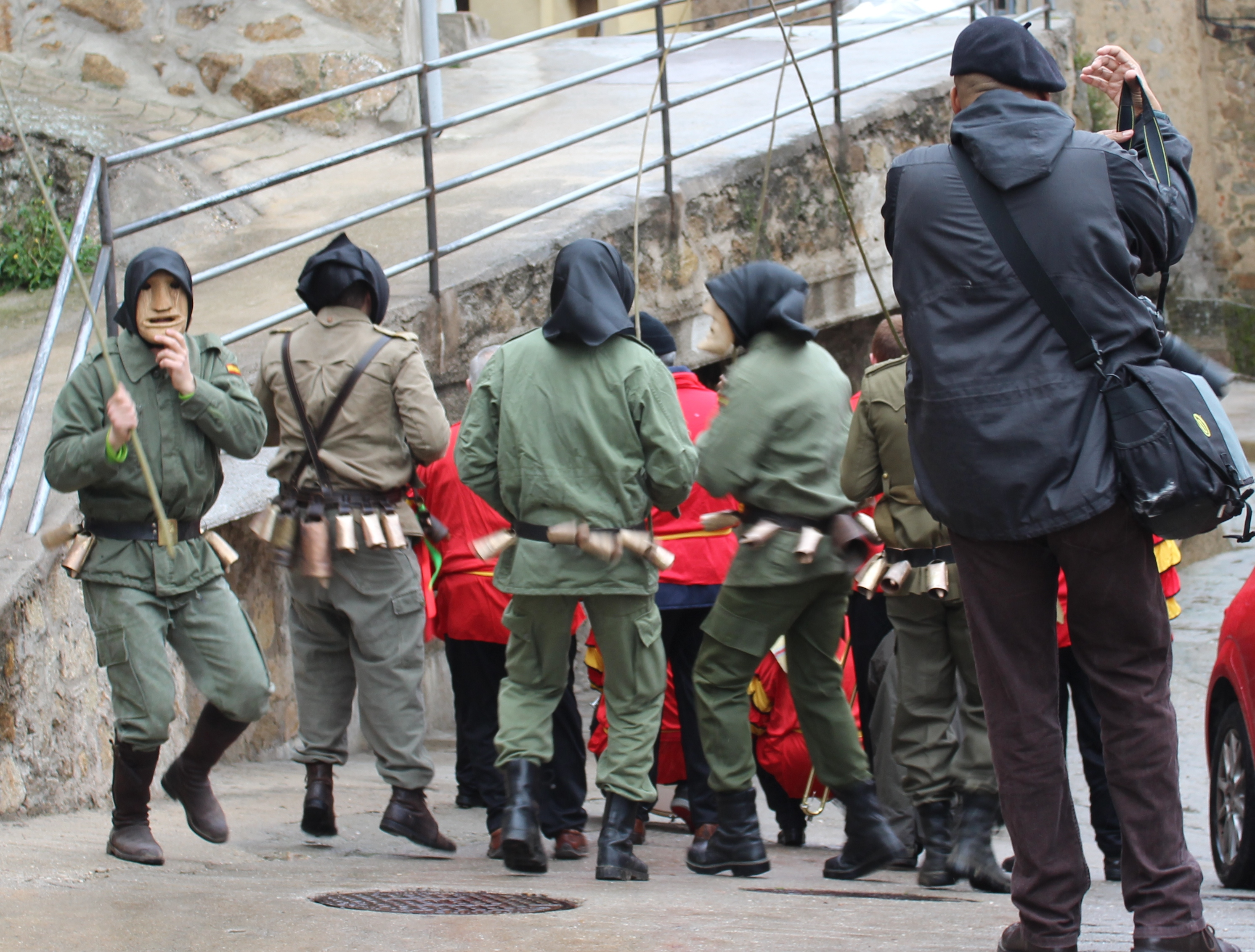 Machurreros por las calles de El Santo (2014)